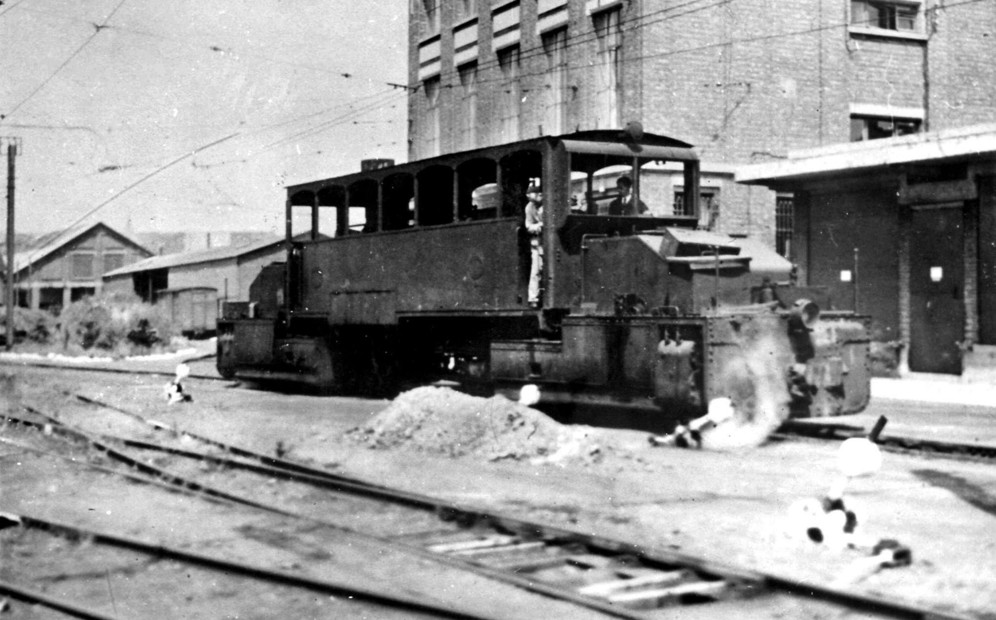 HL 0850 TYPE 23 "GARRAT" / HASSELT / COLLECTION DALLONS